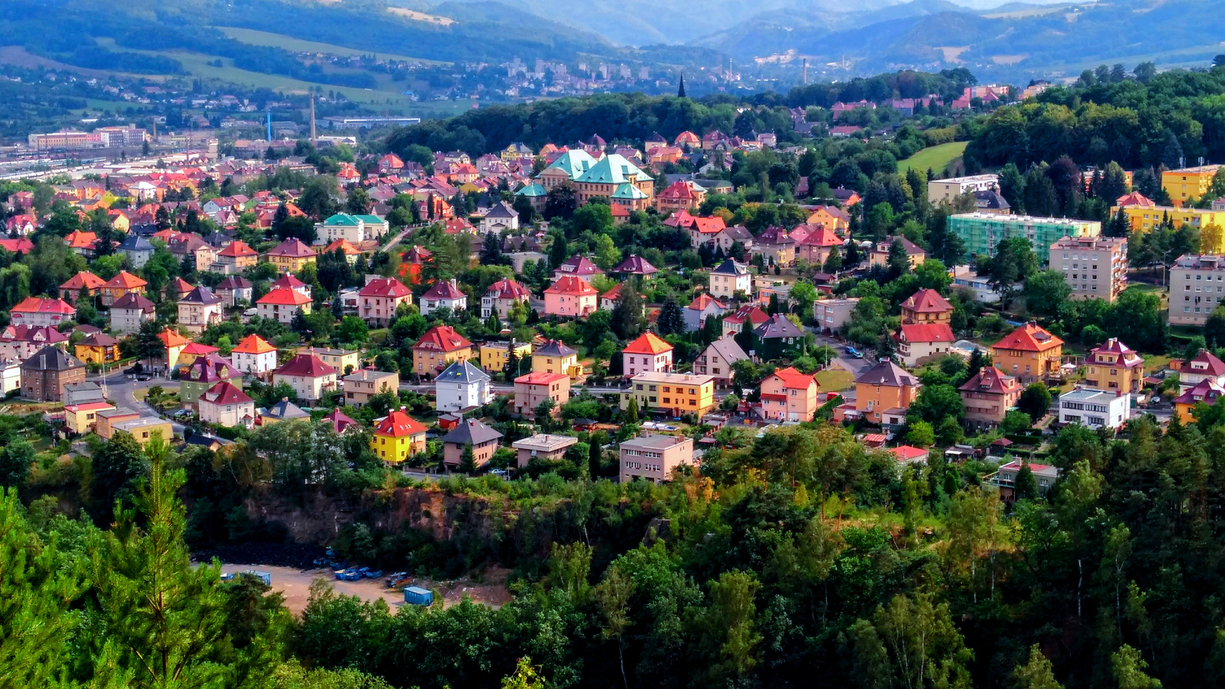 Letná ze severu.